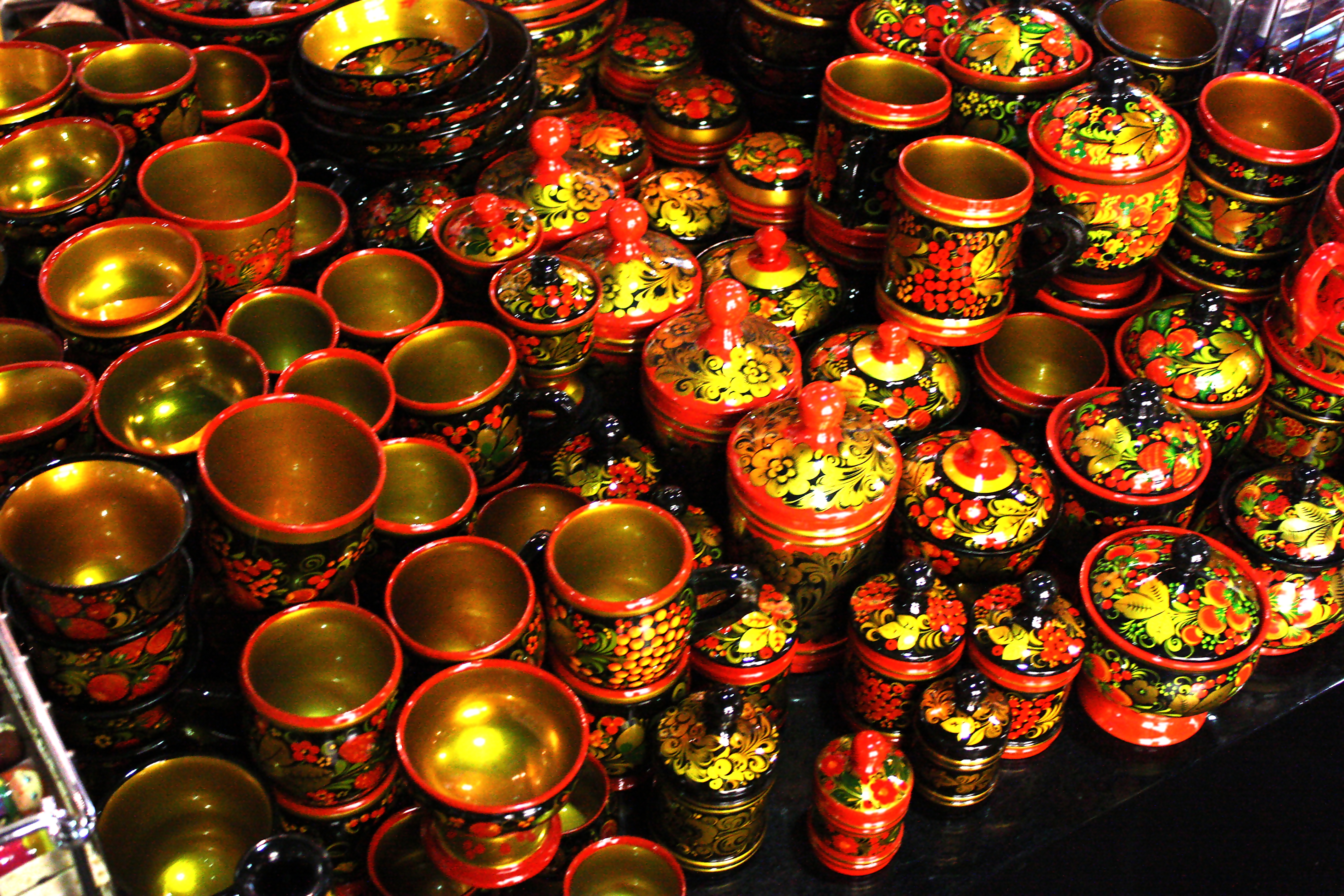 Khokhloma - Chochloma - хохлома, St. Petersburg, 2009, magazin Berjoska, for foreign tourists